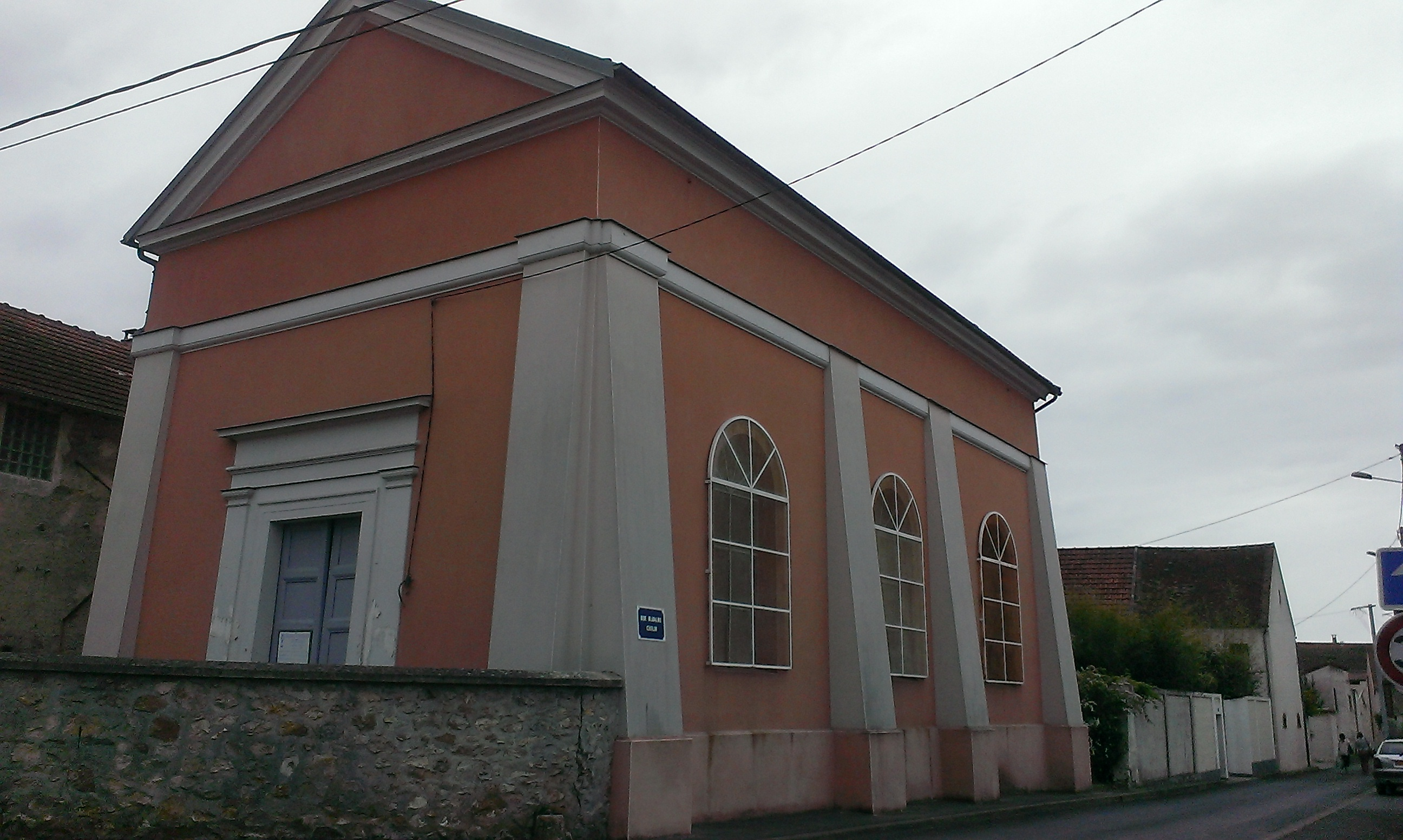 Temple protestant, Quincy-Voisins (77)